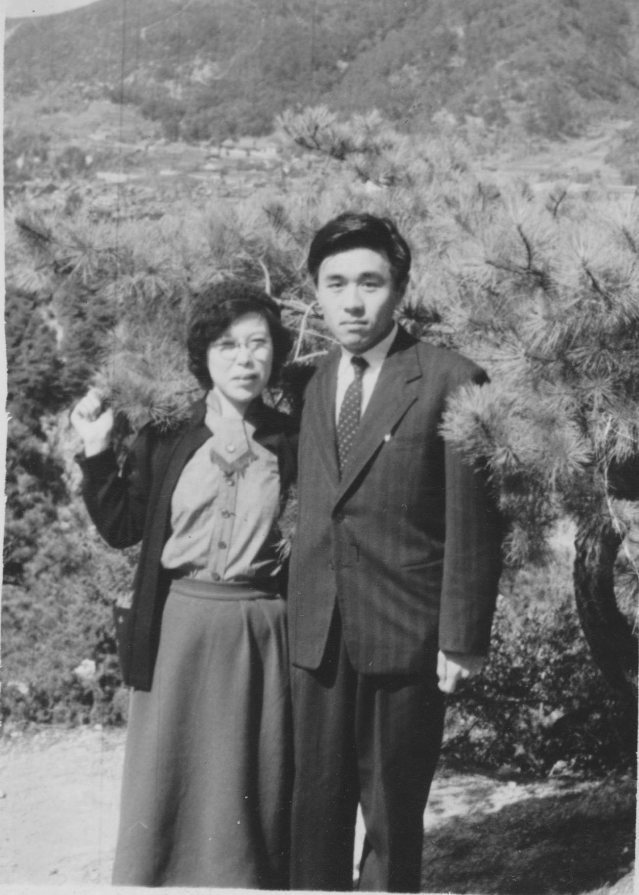 新婚旅行にて